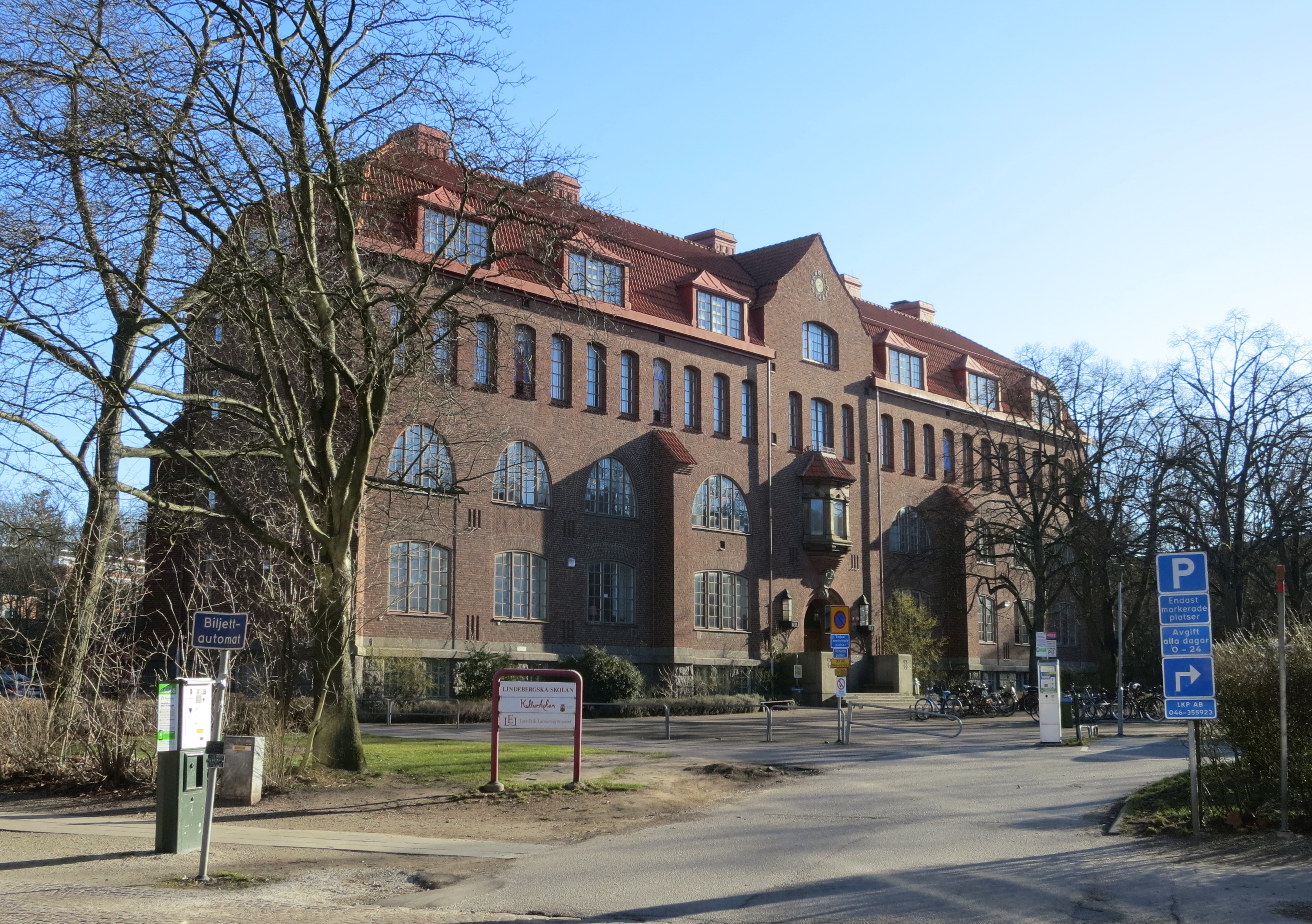 Lindebergska skolan i Lund